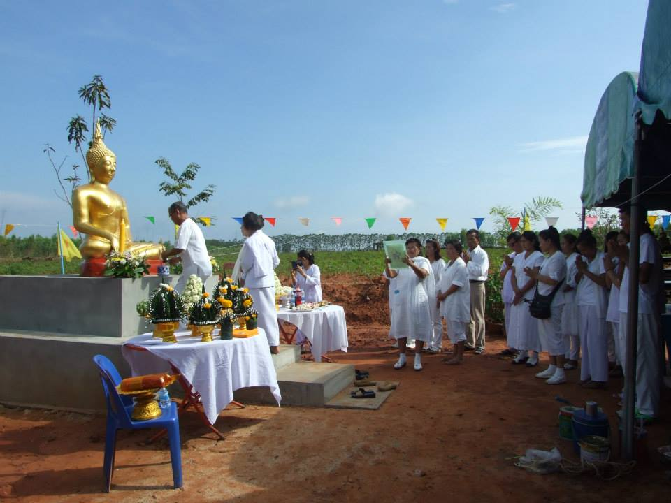 พระประธานพระพุทธรูปประจำศาลา ปาง นั้งสมาธิ ชาวคณะบ้านอิติสุคะโต ร่วมกับ #คุณวิวรรณ บุญยประทีปรัตน์ คุณแม่พราหม์ธีราพร น่วมอินทร์ #คุณแม่ต้อย อินทิราพา ได้ฤกษ์งาม คุณพี่เติ่ง ผ่องศรี มนุษยธรรม #คุณไอซ์ พิเชษฐ สภาพพงษ์ พร้อมครอบครัว และคณะญาติธรรม เดินทางไปแสวงบุญ ถวายพระประธานปางมารวิชัย และพระสิวลี ณ วัดอรุณพัฒนา (วัดสามขา) อ.ลำทะเมนชัย จ.นครราชสีมา